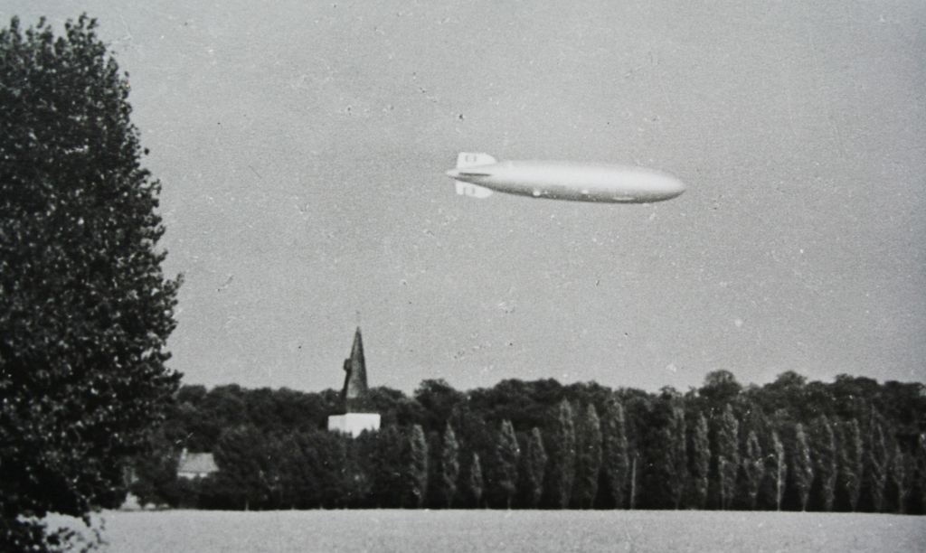 LZ 129 überfliegt Passendorf